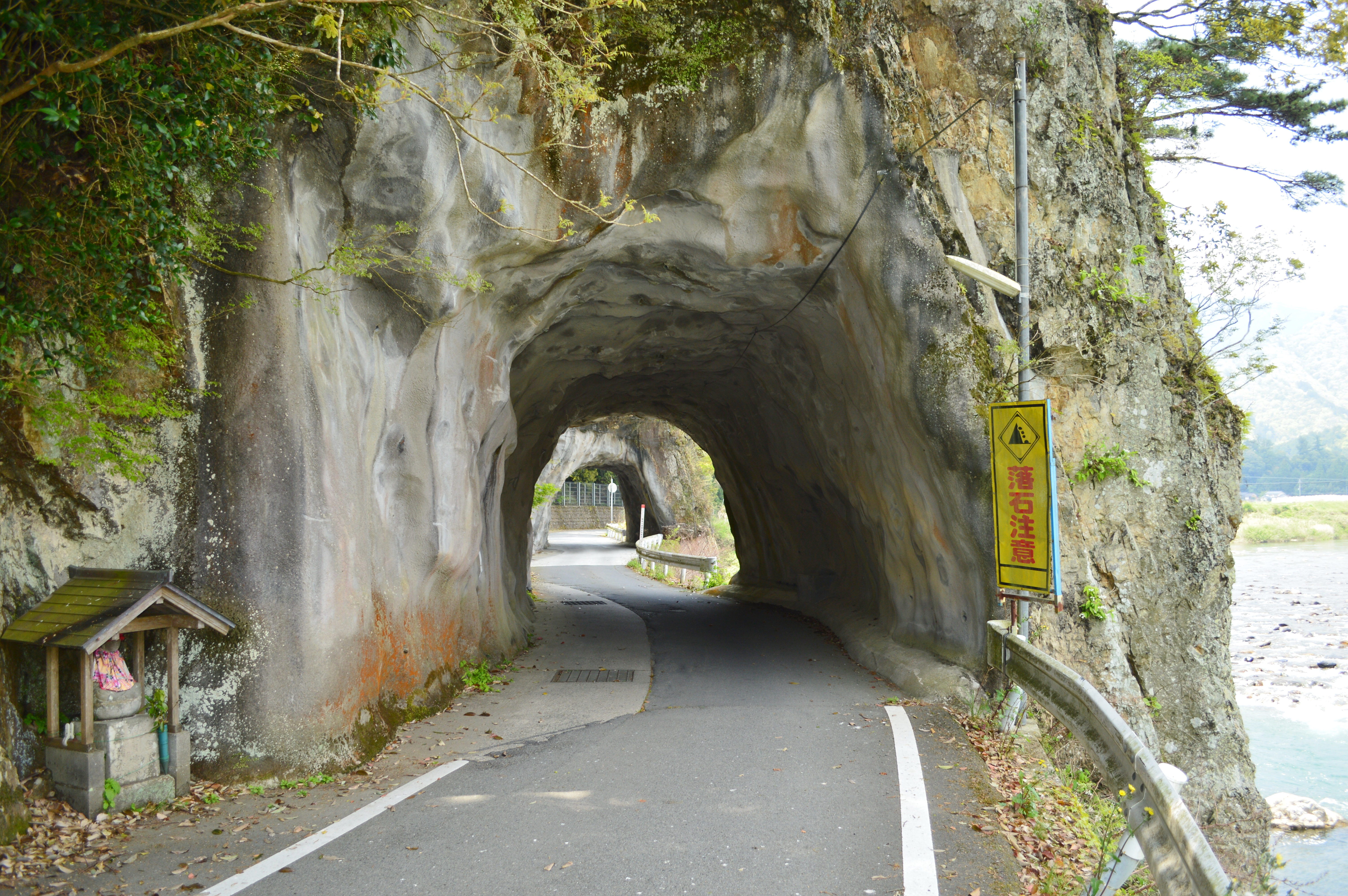 与位の洞門 Nikon D3200